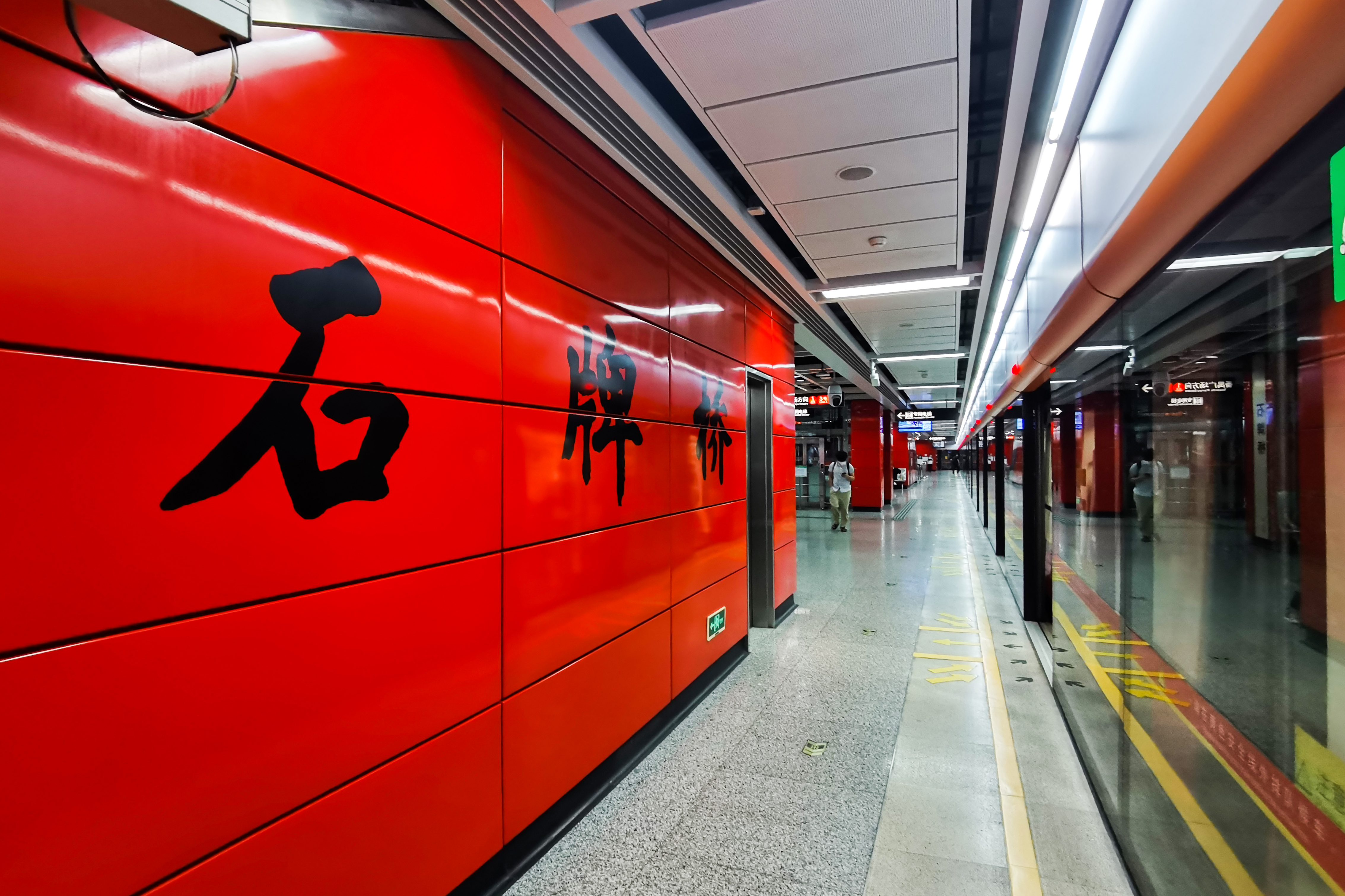 广州地铁石牌桥站